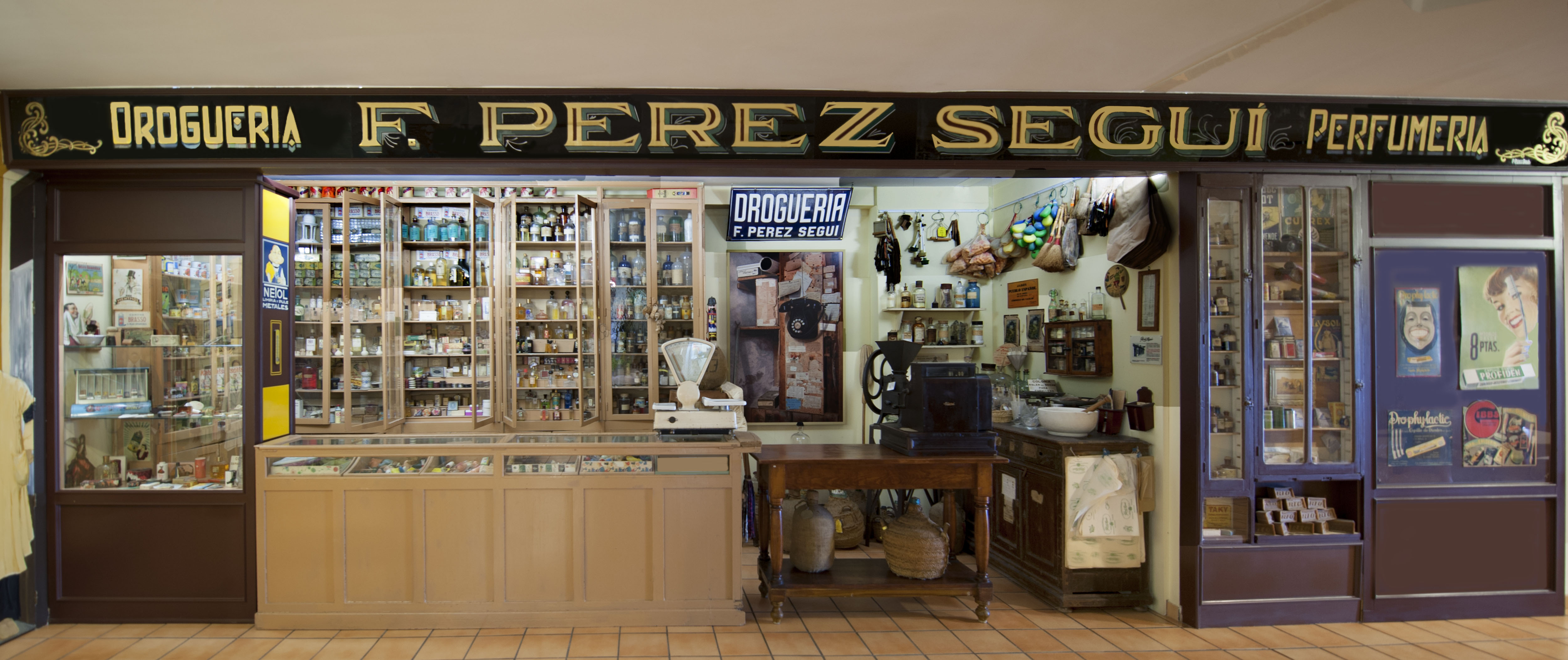 Aspecto del Museo Escolar de Pusol